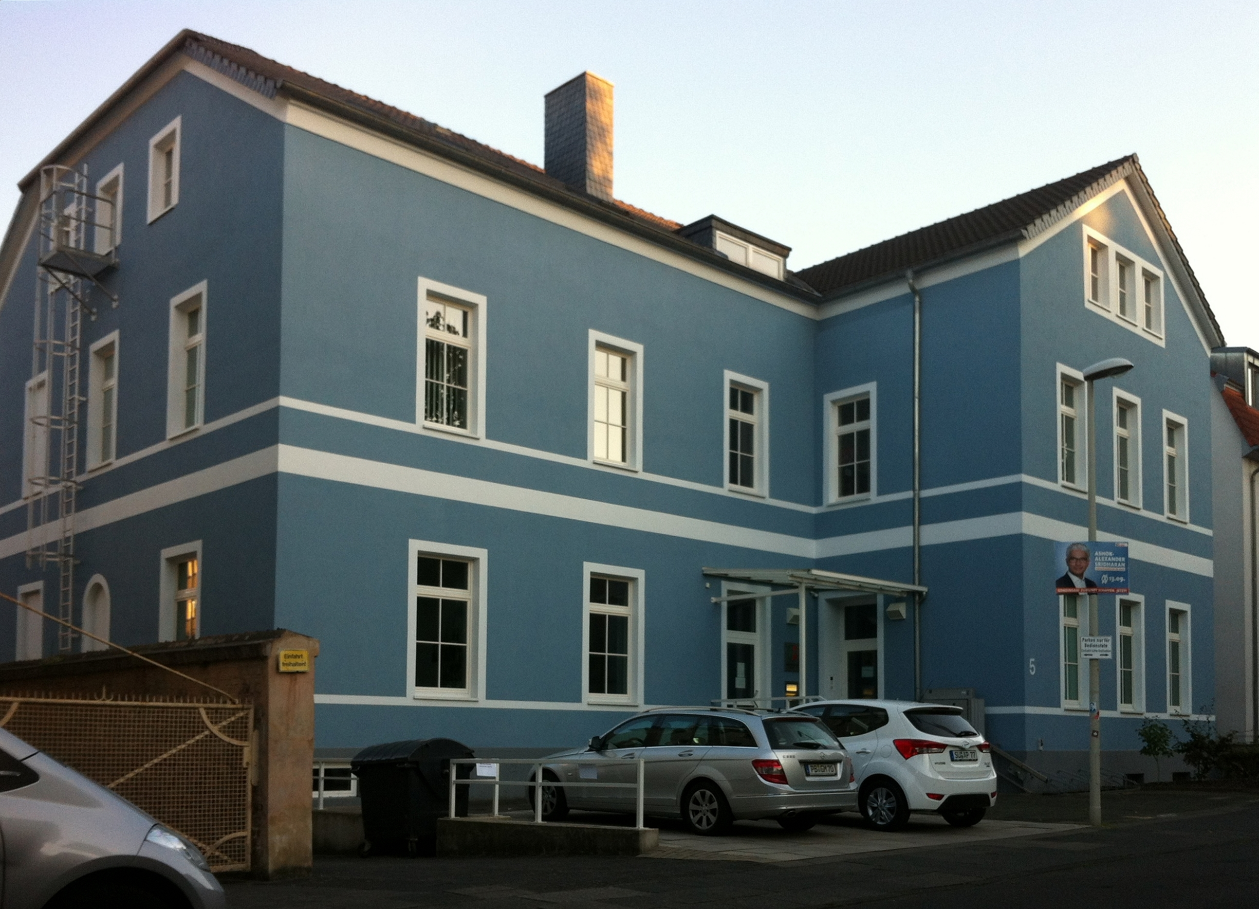 Deutschland, NRW, Bonn, Kreuzbergweg 5: Arbeitsgericht.